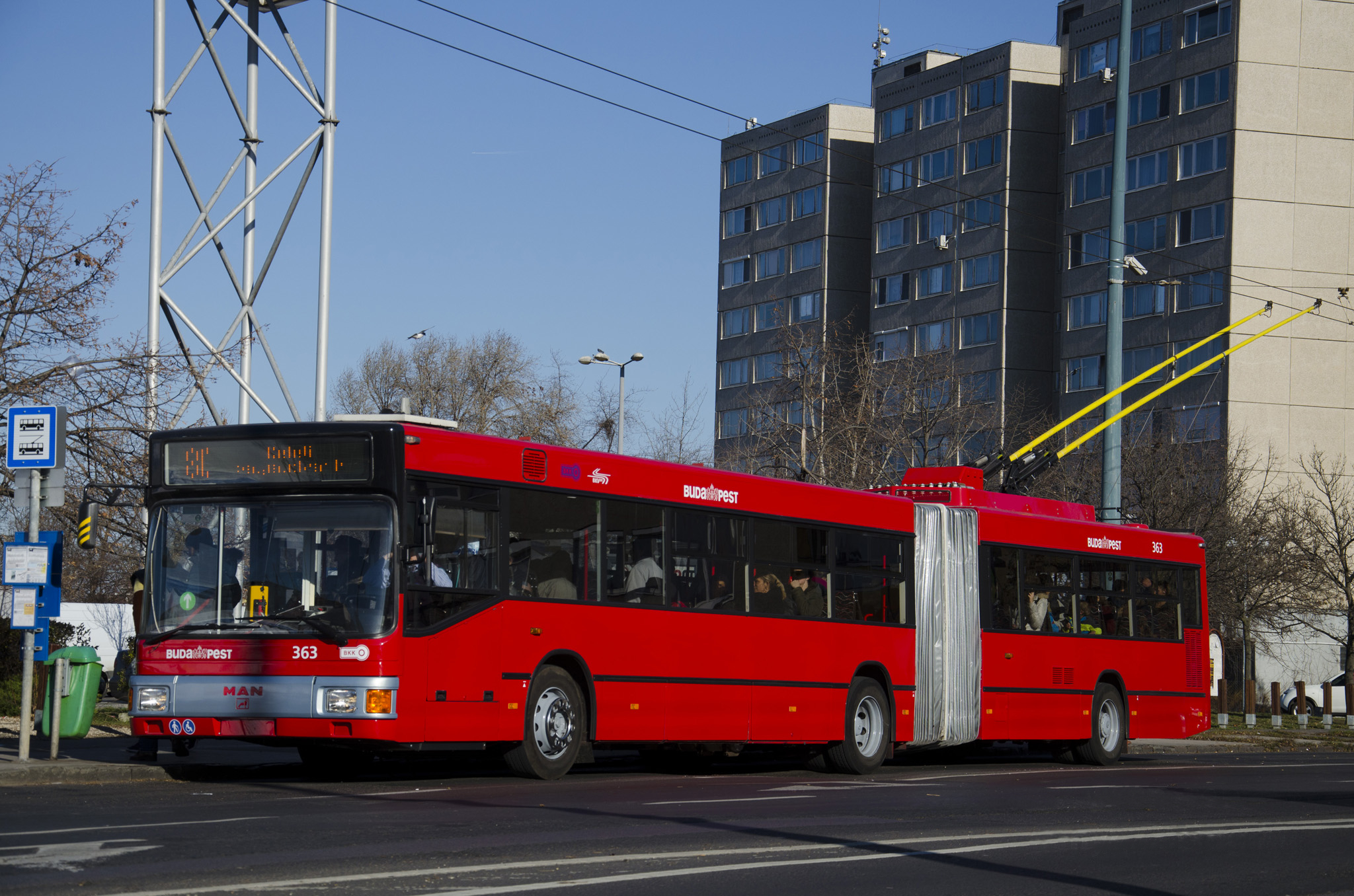 MAN NGE152 trolibusz a Fogarasi úton (psz. 363)